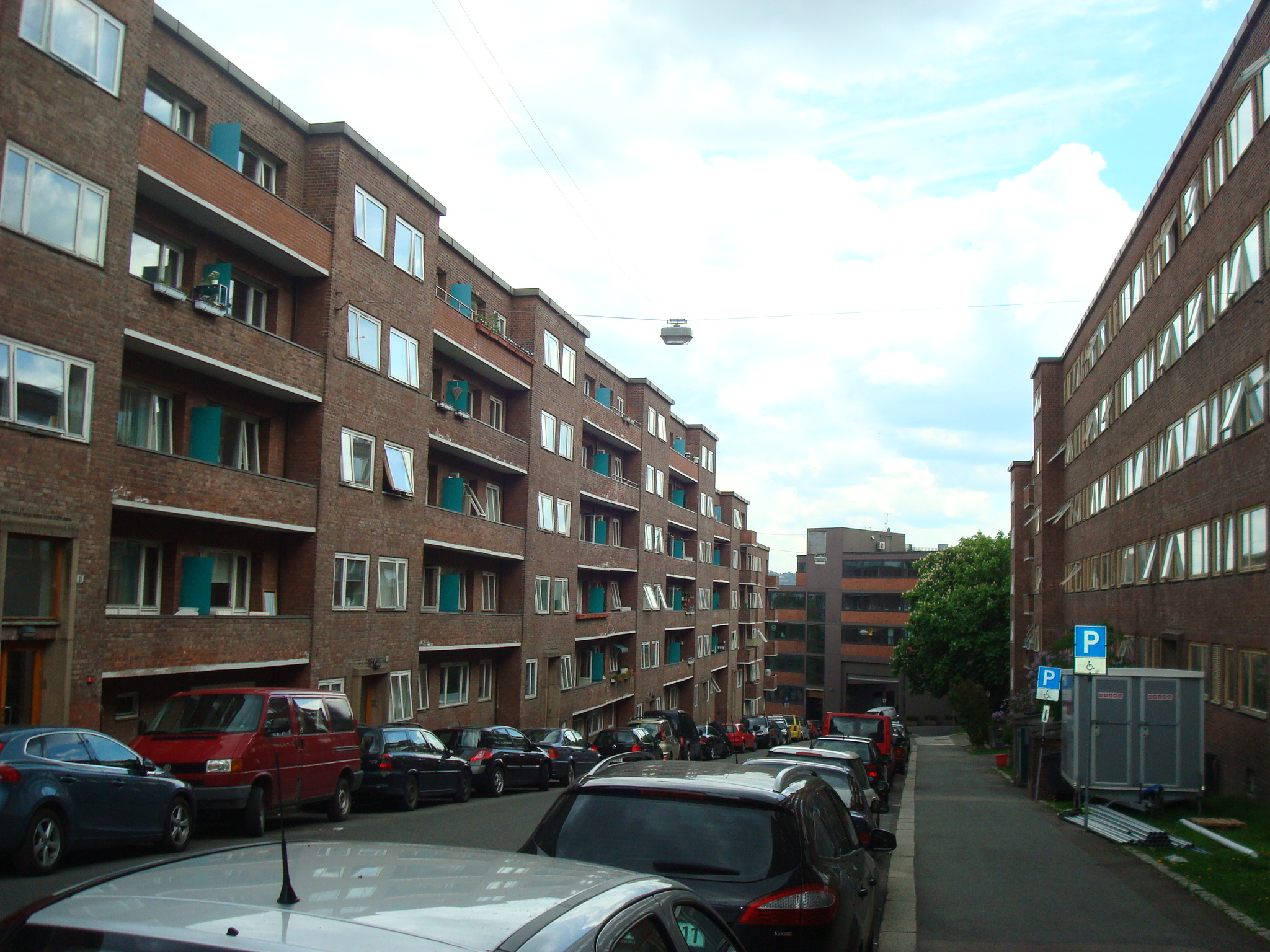 Casparis gate (Oslo).